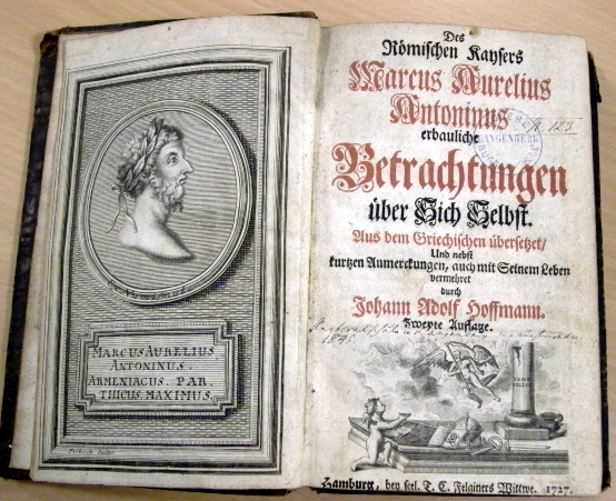 Marc Aurel BetrachtungenAzərbaycanca: Mark Avrelinin alman dilində "Betrachtungen" əsəri